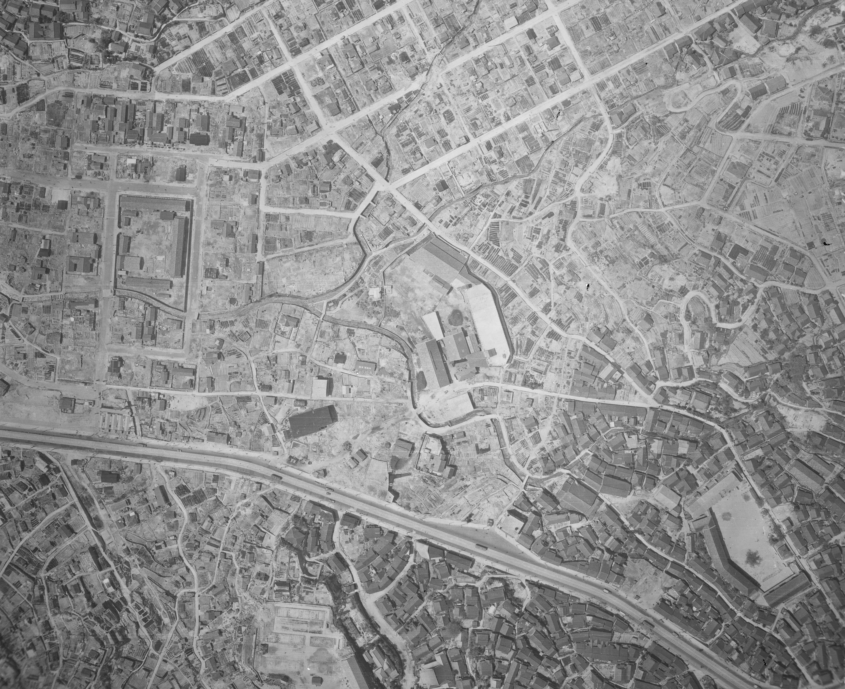 1947年の広島県呉市の三宅本店周辺